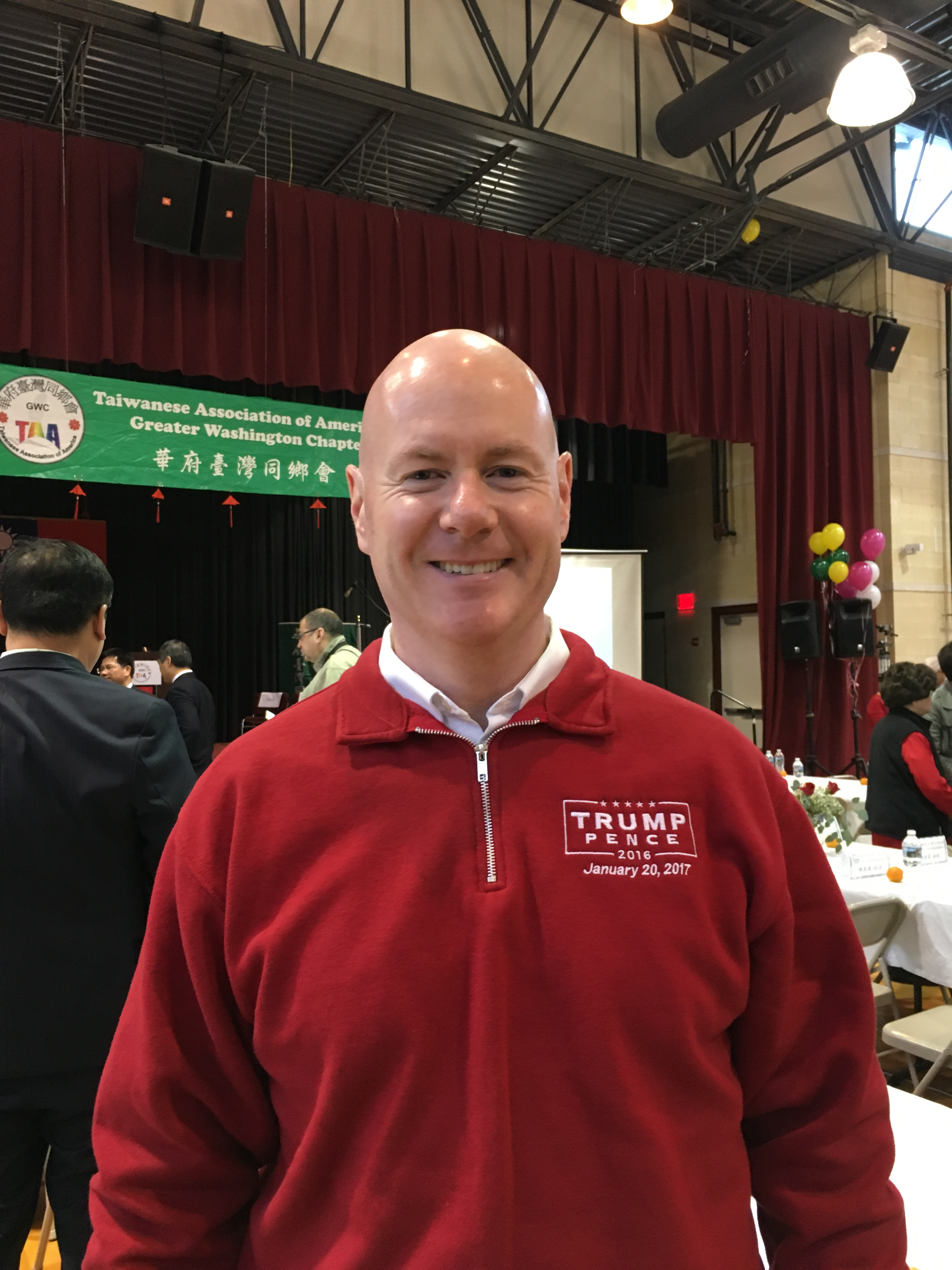 愛達荷州共和黨主席葉望輝參加華府台灣同鄉會春節餐會